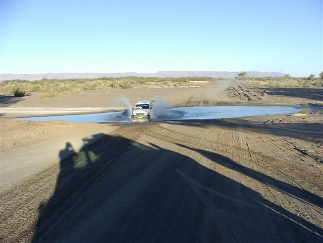 Löwenfluss